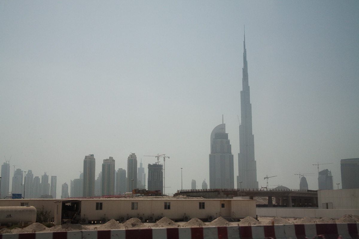 Burj Dubai from far